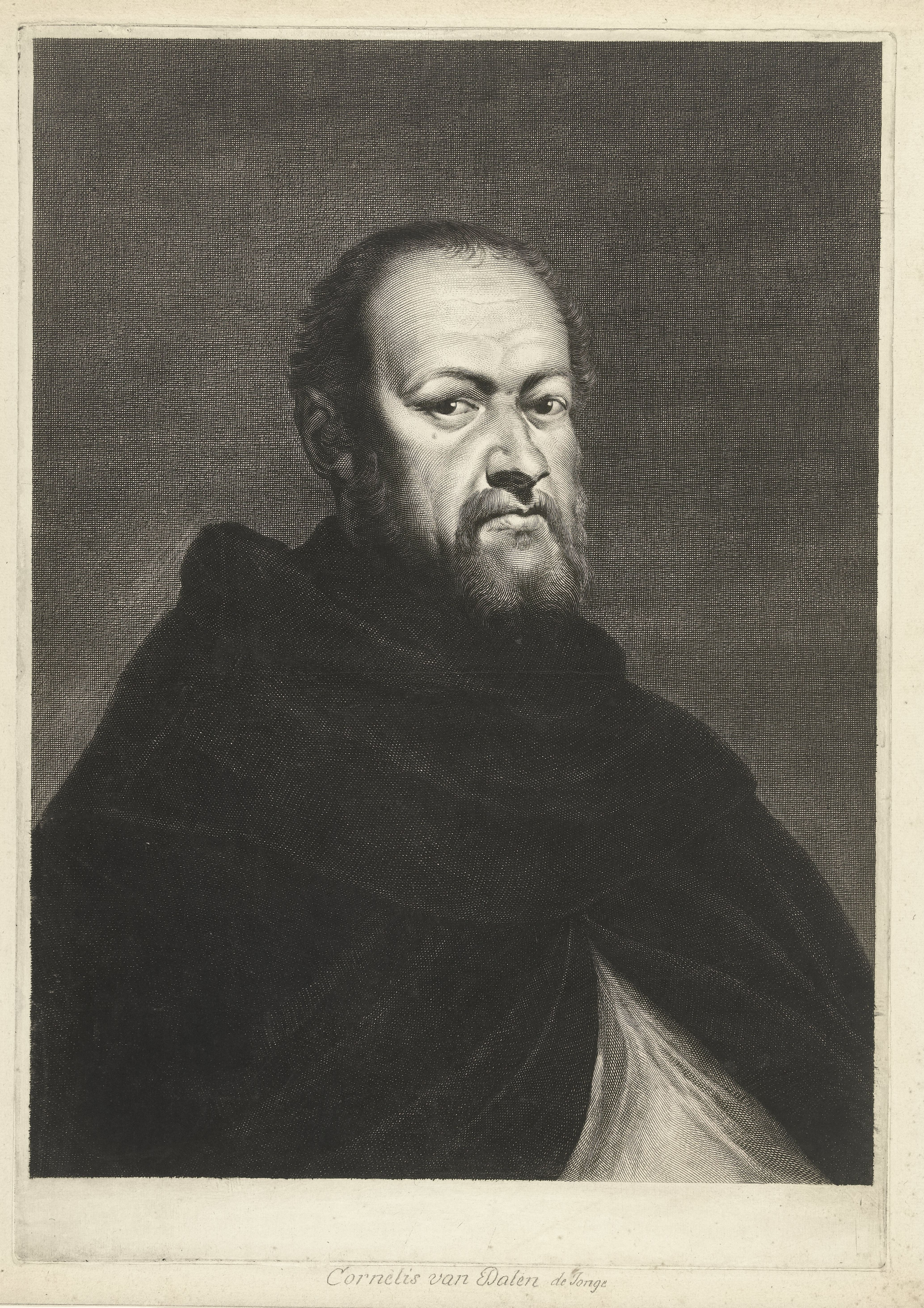 IdentificatieTitel(s): Portret van schilder Sebastiano del Piombo Caelaturae (serietitel)Objecttype: prent Objectnummer: RP-P-OB-50.017Catalogusreferentie: Hollstein Dutch 111-1(4)Opschriften / Merken: verzamelaarsmerk, verso, gestempeld: Lugt 240VervaardigingVervaardiger: prentmaker: Cornelis van Dalen (II)naar schilderij van: TitiaanPlaats vervaardiging: AmsterdamDatering: 1648 - 1664Fysieke kenmerken: gravureMateriaal: papier Techniek: graveren (drukprocedé)Afmetingen: plaatrand: h 412 mm × b 292 mmToelichtingPrent naar schilderij van Titiaan. Prent uit serie Caelaturae met vierendertig reprodukties naar Italiaanse en Nederlandse schilders, vervaardigd door de allerbeste graveurs in opdracht van de verzamelaar Gerard Reynst. Vergelijk het Reynst album uit de verzameling van Michiel Hinloopen met vier portretten door Cornelis van Dalen (II) in eerste staten in het Rijksmuseum, zie Waals 1988, p. 103, 104.OnderwerpWat: portrait, self-portrait of painterWie: Sebastiano del PiomboVerwerving en rechtenVerwerving: overdracht van beheer 1816Copyright: Publiek domein